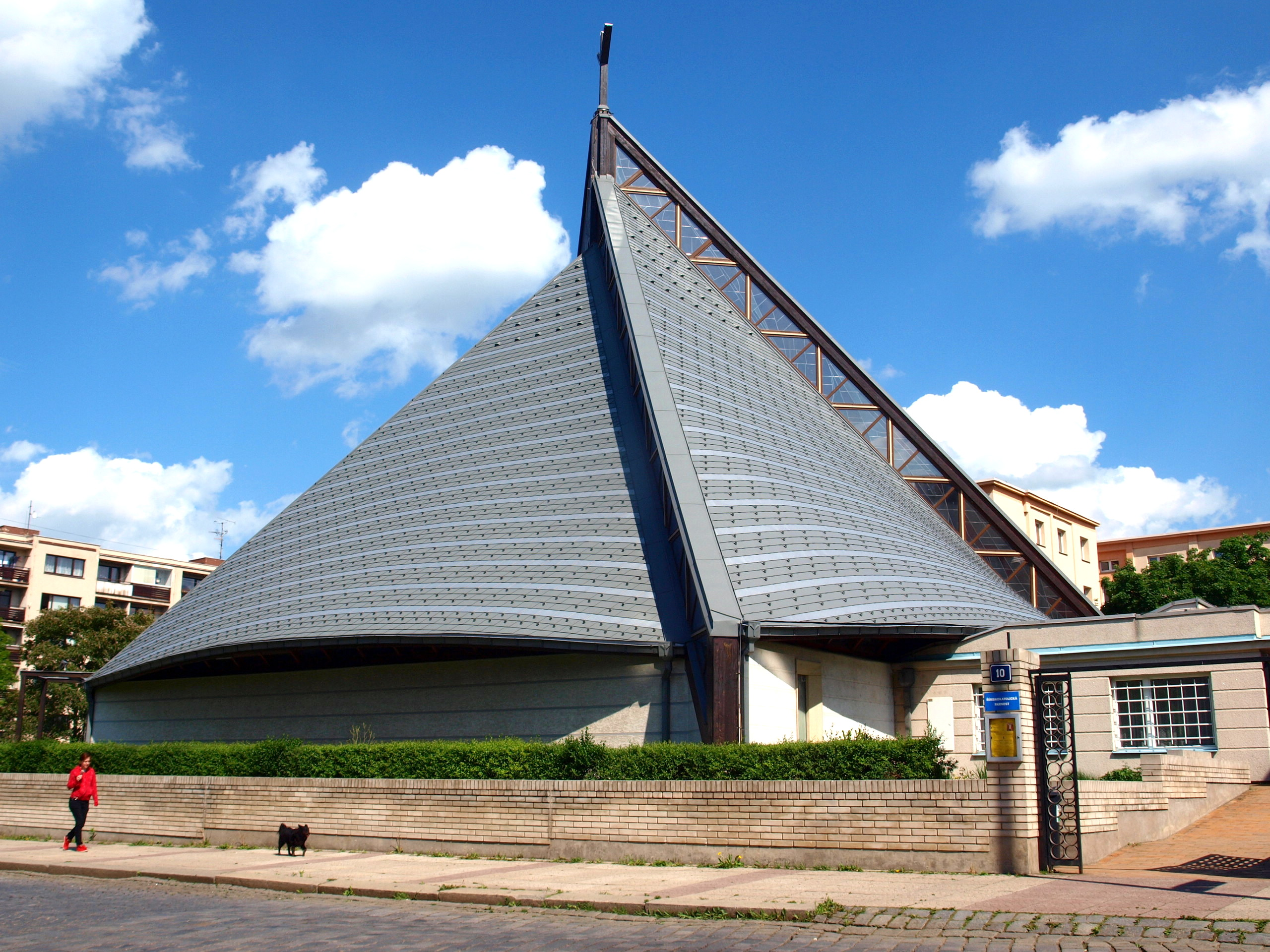 Kostel Neposkvrněného početí Panny Marie ve Strašnicích